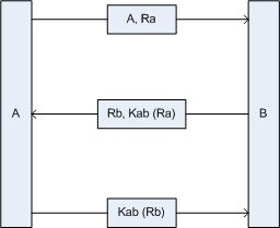 visio plaatse